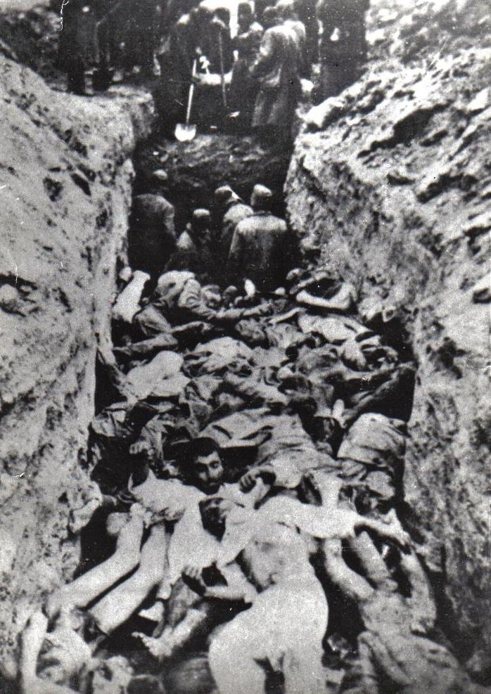 Расстрел евреев - узников гетто в деревне Ленин Житковичского района 14 августа 1942 года. Сделано немцем - одним из участников убийства. Плёнку он сдал проявлять в фотоателье. Часть специалистов из узников гетто нацисты использовали в личных целях – в соответствии с их специальностью, среди них оказалась и Фаина Лазебник (Фогельман). Будучи работницей фотоателье, она сумела спрятать и сохранить негатив, после войны он оказался с ней в Канаде, потом был передан в Израиль, а оттуда - в дар музею деревни Ленин. На переднем плане в убитом мужчине местные жители опознали Цукровича - лучшего в округе мастера по пошиву женских головных уборов.